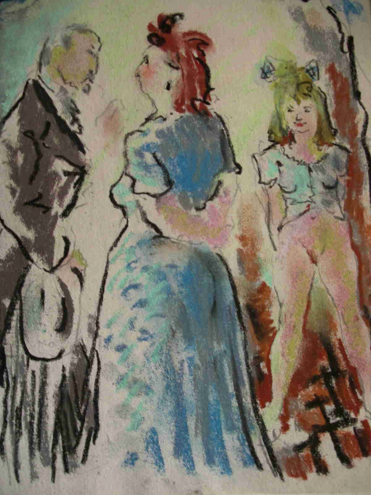 A La Lanterne